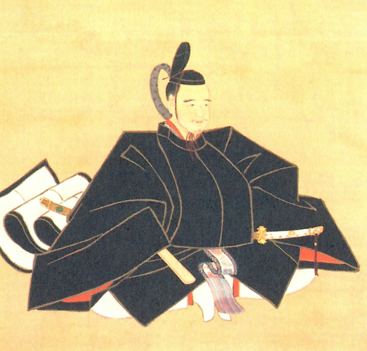 伊達重村の肖像。